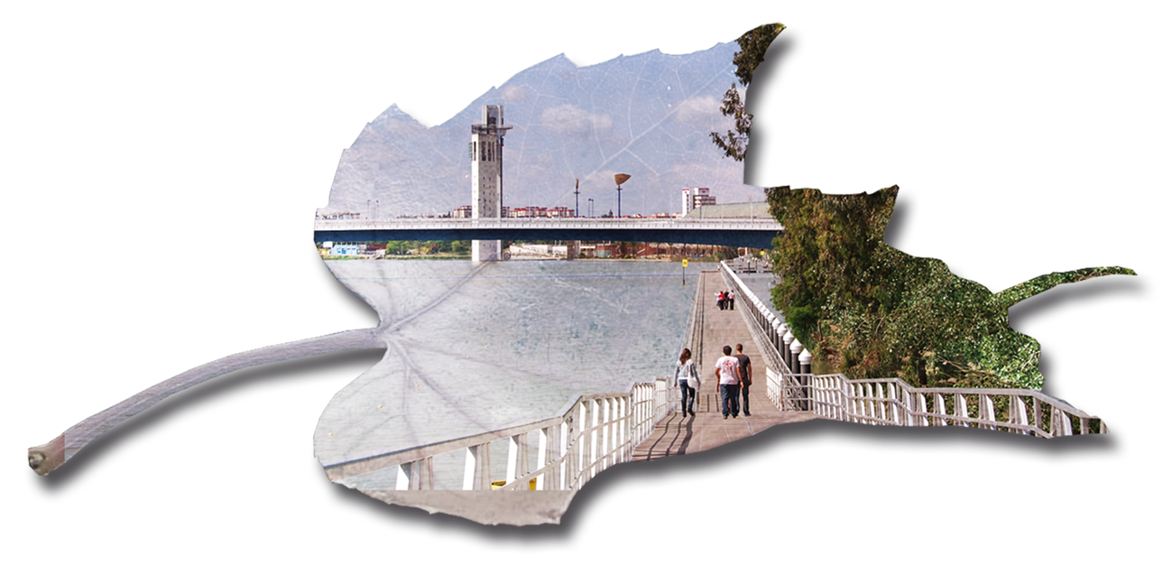 Pasarela río Guadalquivir - Jardín Americano de Sevilla